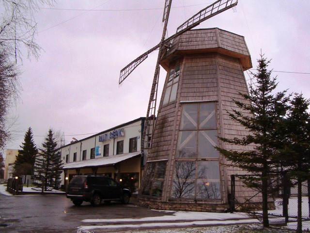 Veski kõrts. Laki 11A. Laki I kvartal (Kadaka asum). Tallinn.